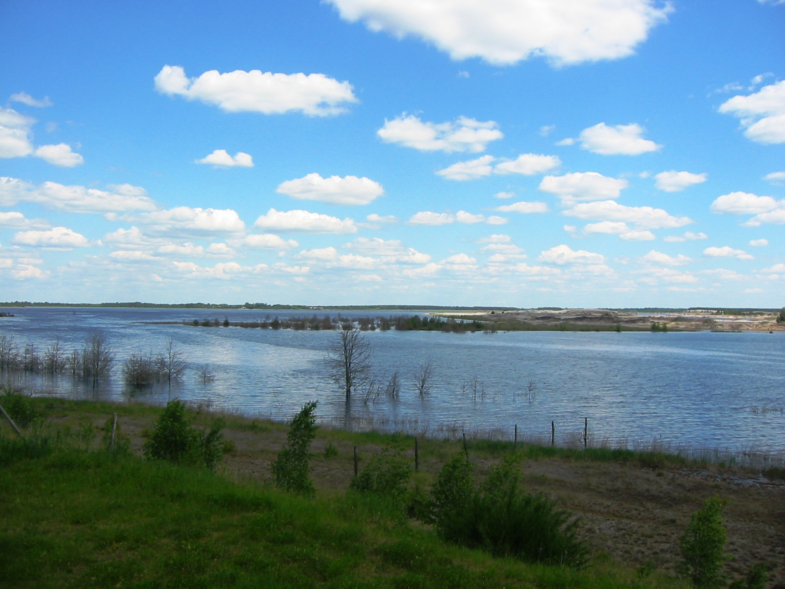 Blick auf den Schlabendorfer See aus der Sielmanns Naturlandschaft Wanninchen.